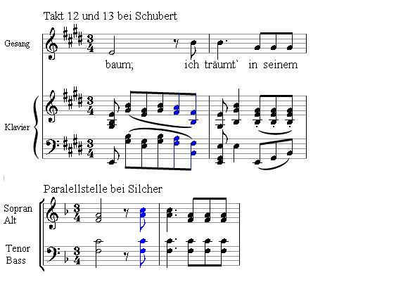 Harmonische Unterschiede bei Schuberts und Silchers Version des Lindenbaums